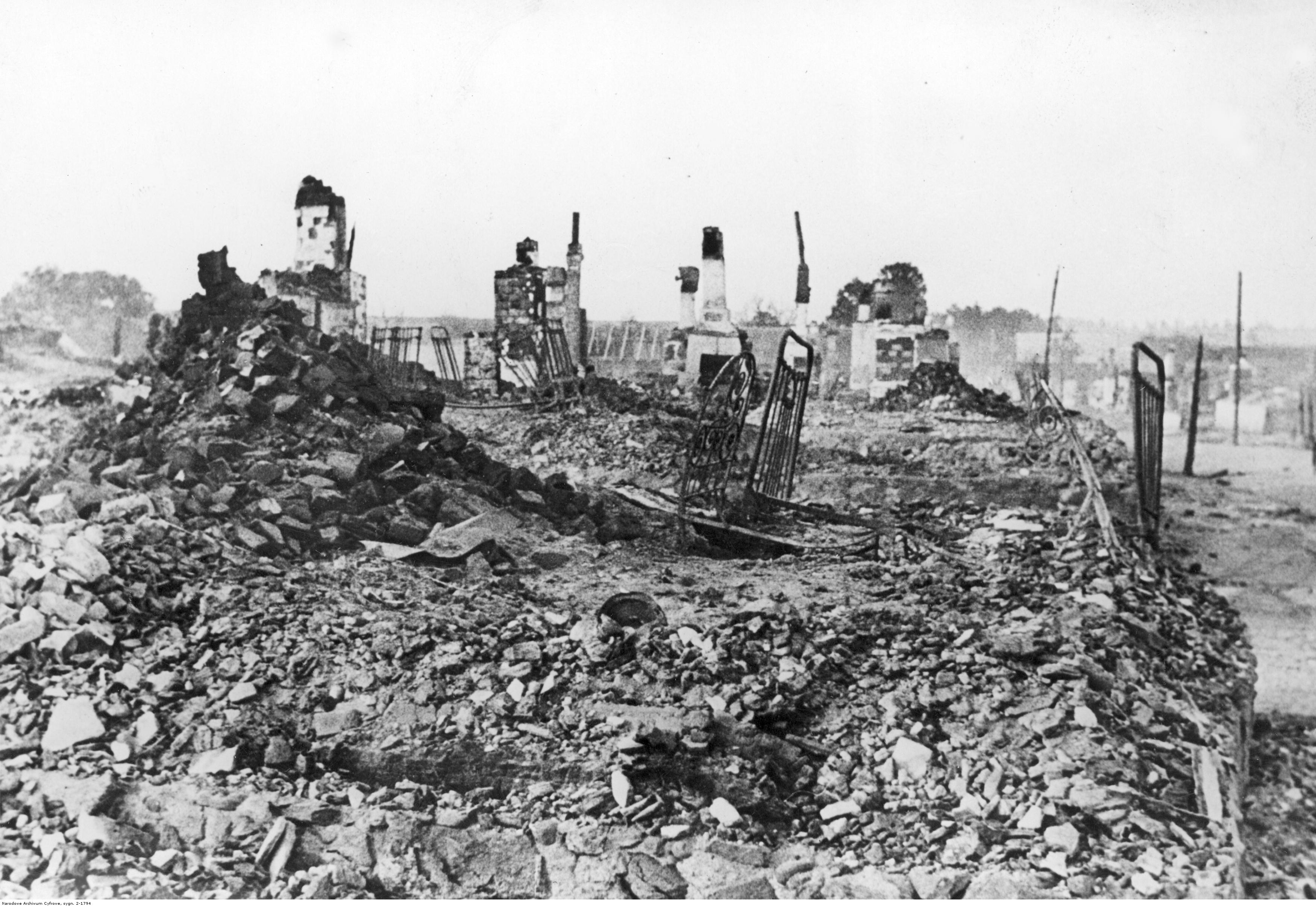 Zabłudów koło Białegostoku. Fragment ruin miasta.